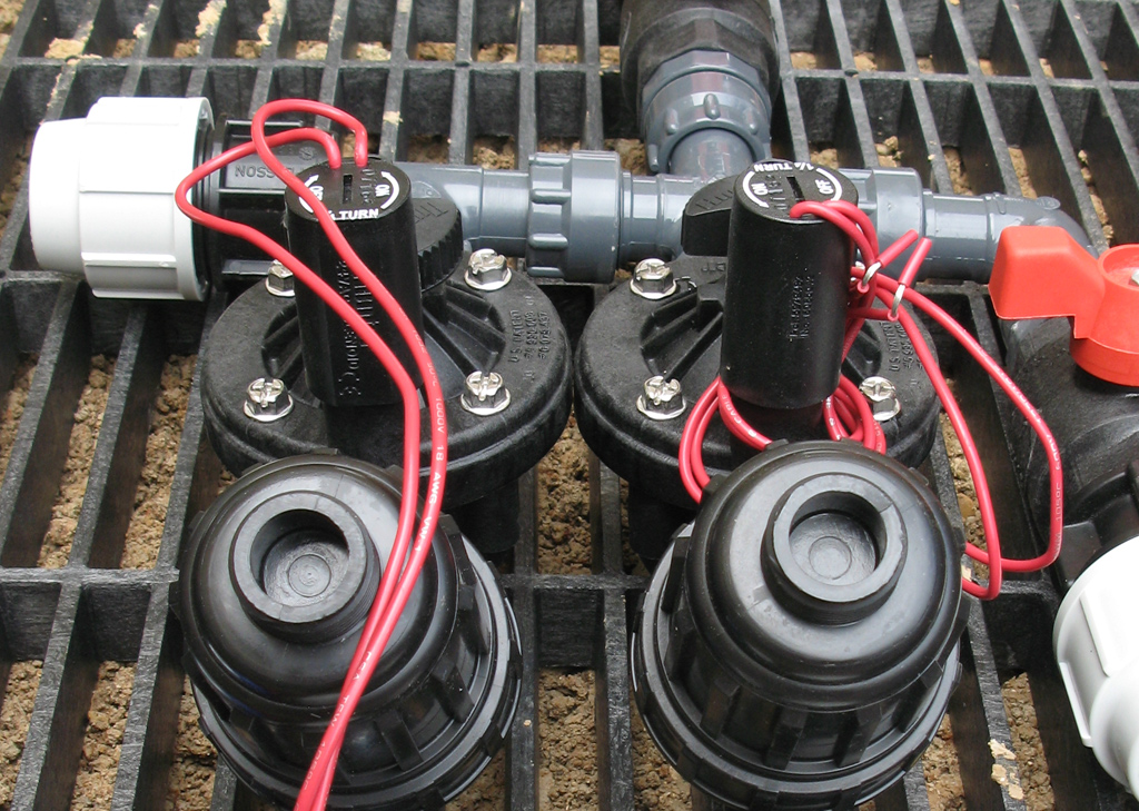 électrovanne de marque Hunter Industries